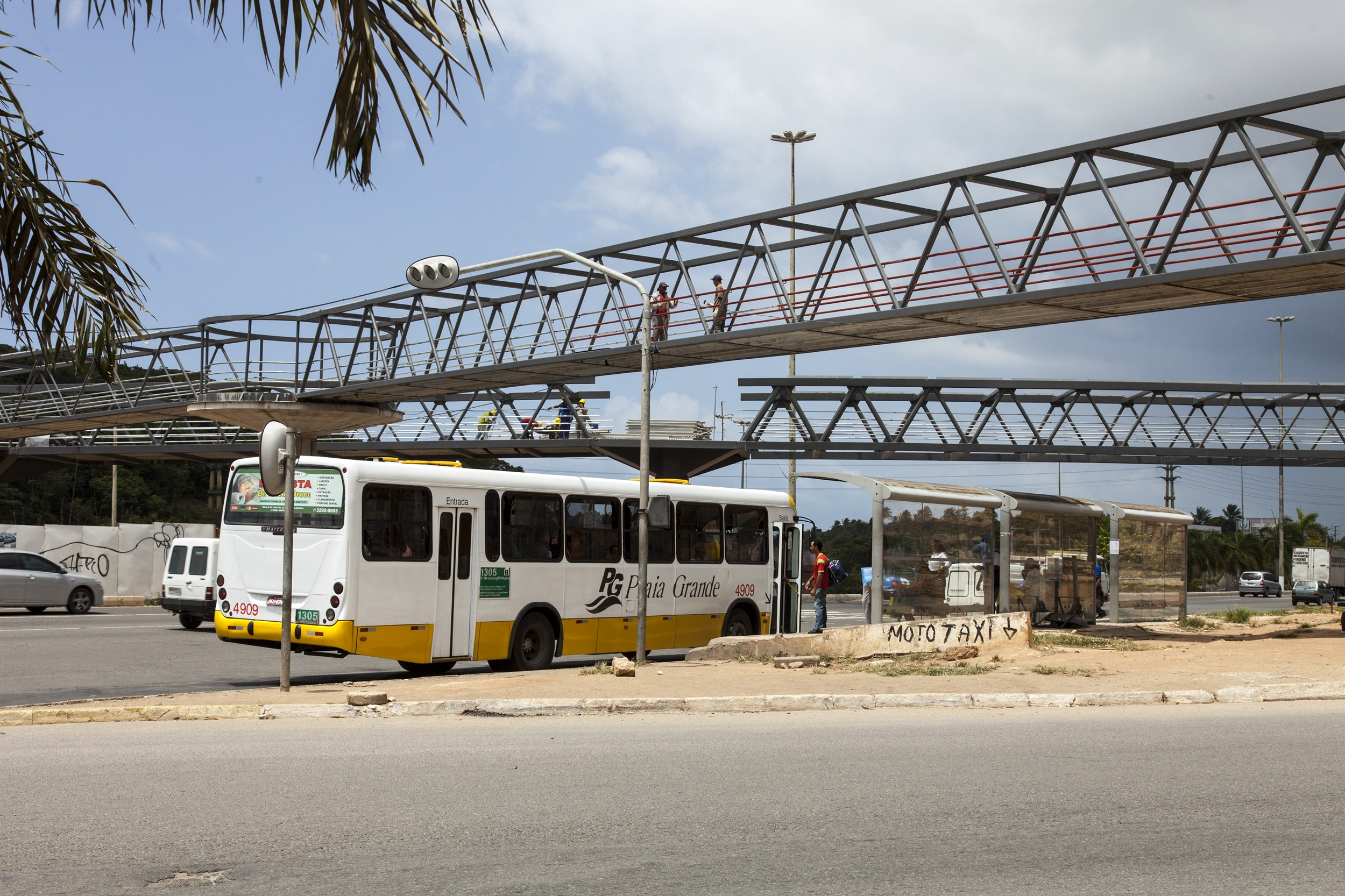 Um ônibus da Praia Grande Transportes, na Avenida Paralela, Salvador.